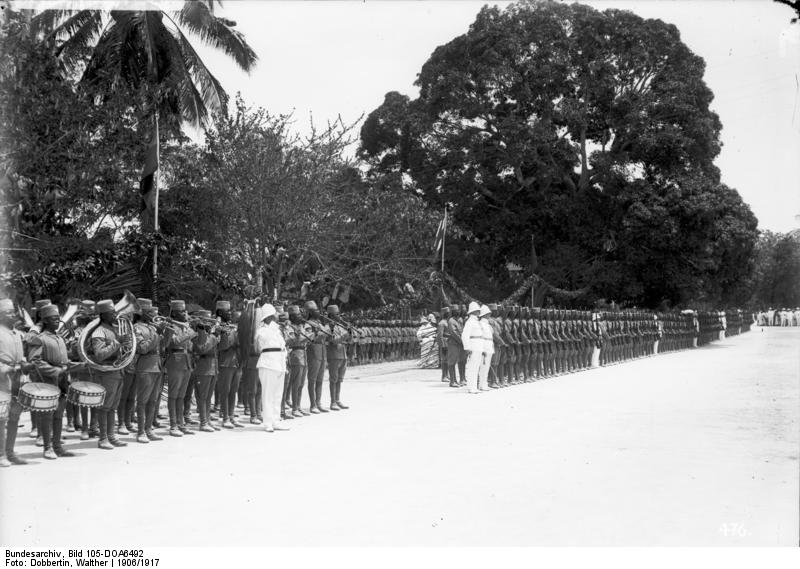 Kaisers Geburtstag in Daressalam auf dem Bismarckplatz